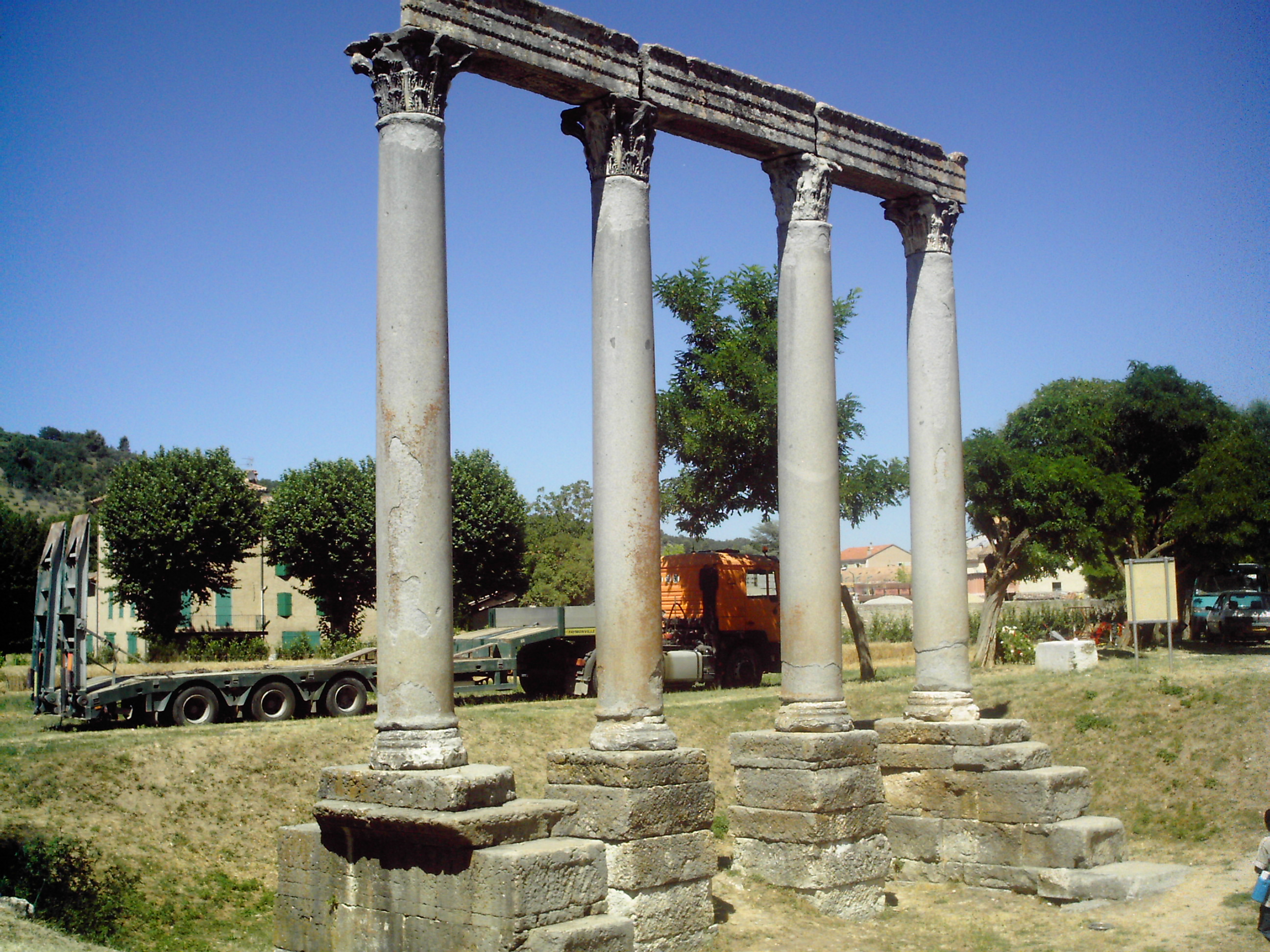 colonnes du temple antique de Riez